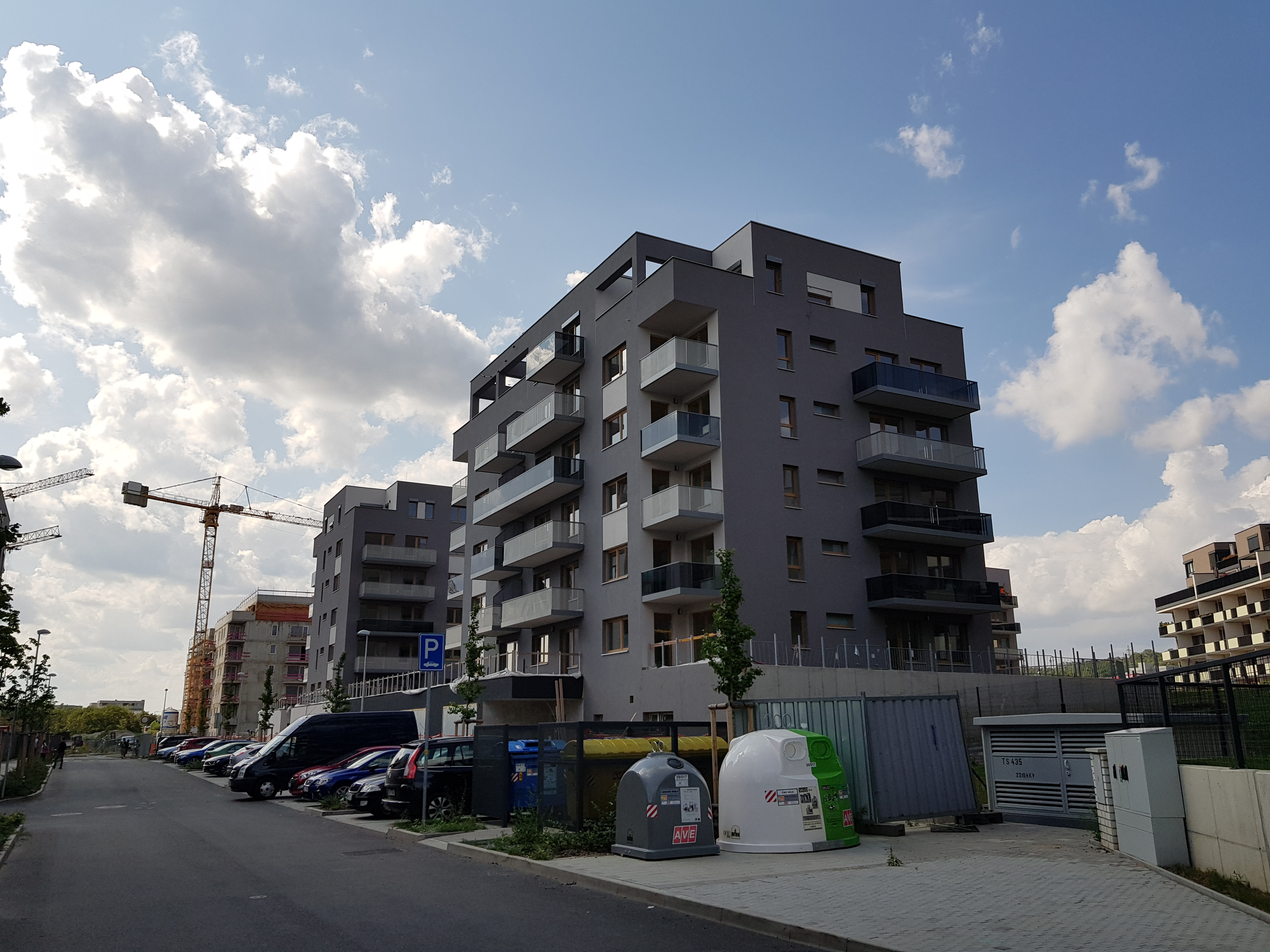 Domy developerského projektu Lahti (čp. 1140), Suomi Hloubětín, pohled z ulice Saarinenova, Praha 9-Hloubětín